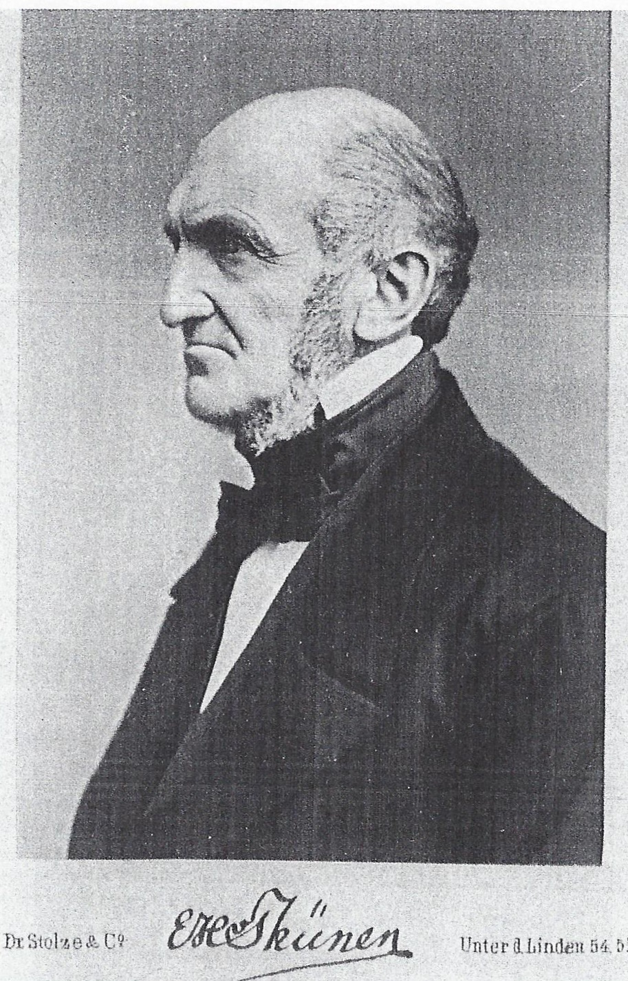 Porträtfotografie von Edo Heinrich von Thünen (1808-1873)